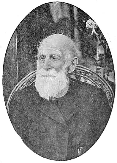 Gabriel Anton Cronstedt